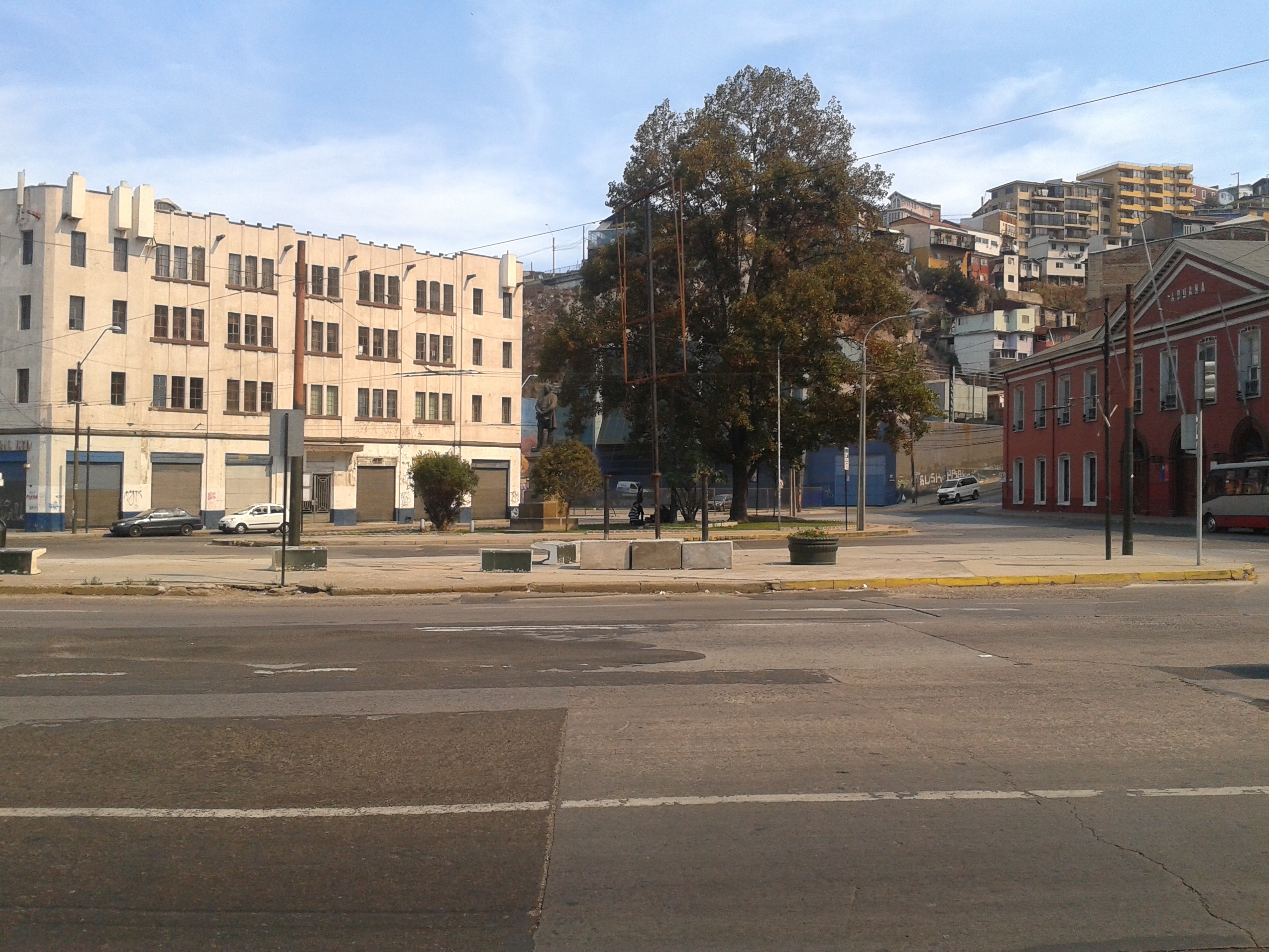 Plaza Wheelwright, fotografía tomada justo el día del gran incendio de Valparaíso el 12 de Abril de 2014.